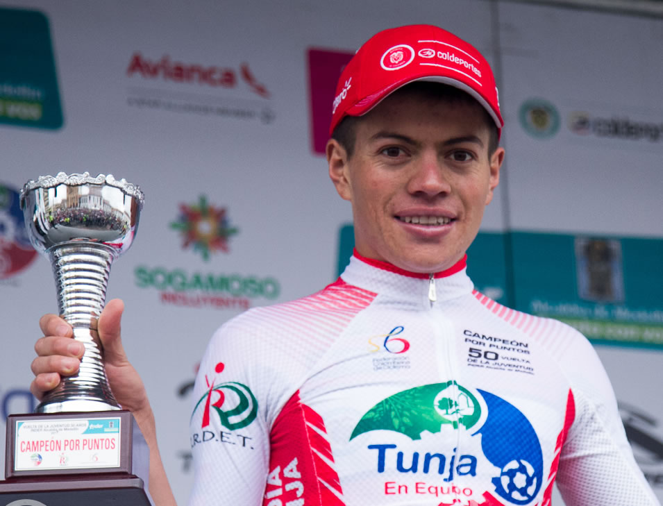 Cristian Camilo Muñoz campeón por puntos de la Vuelta a la Juventud 2017